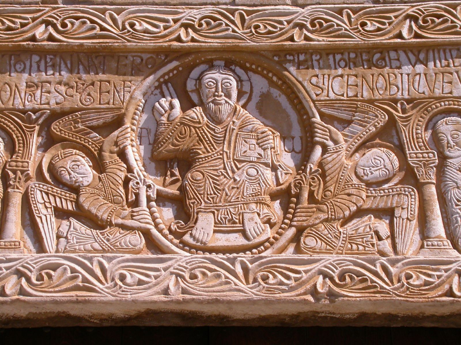 Llinda 1019-1020